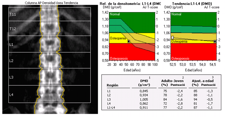 Densitometria òssia a pacient amb osteopènia